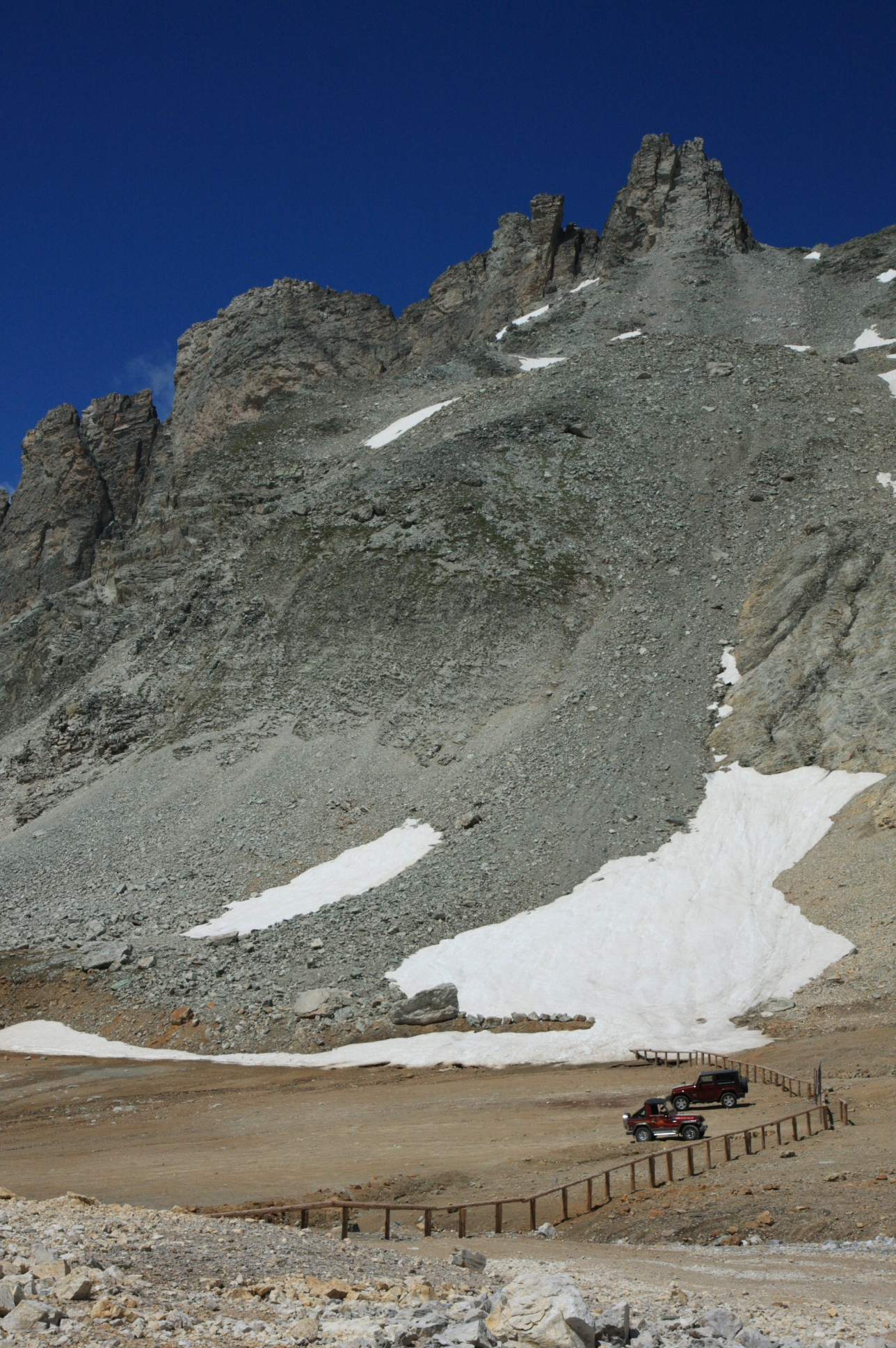 Endpunkt der Piste am Col de Sommeiller